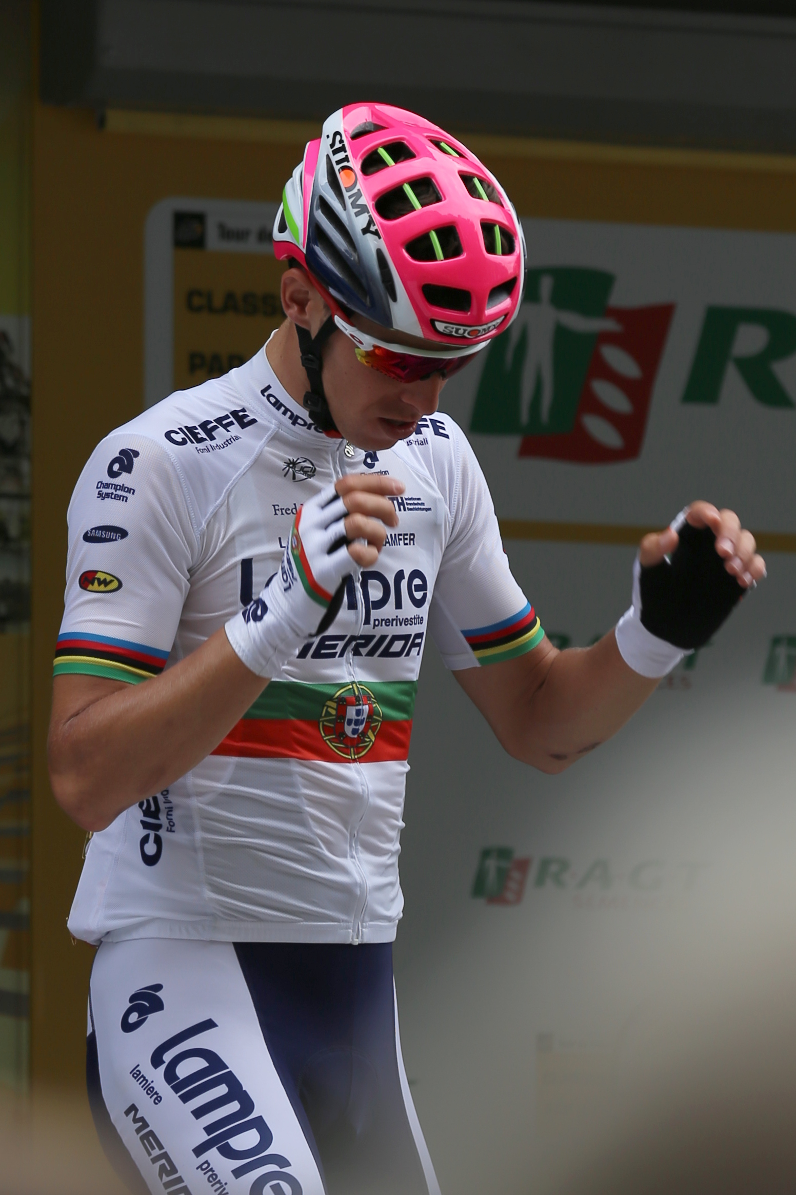 Rui Costa lors du départ de la 8e étape du Tour de France 2015 à Rennes.